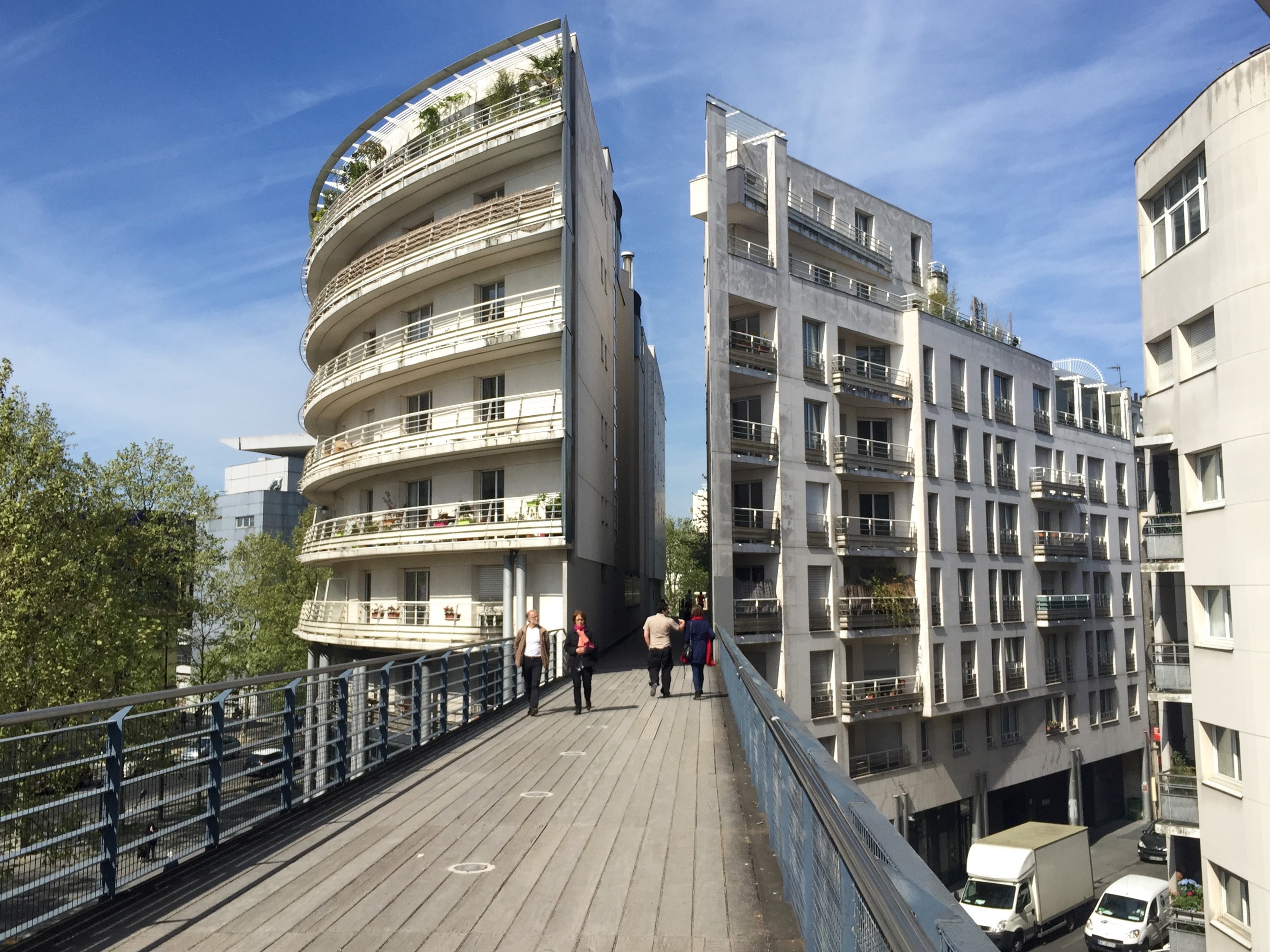 Coulée verte René-Dumont, Paris, France.